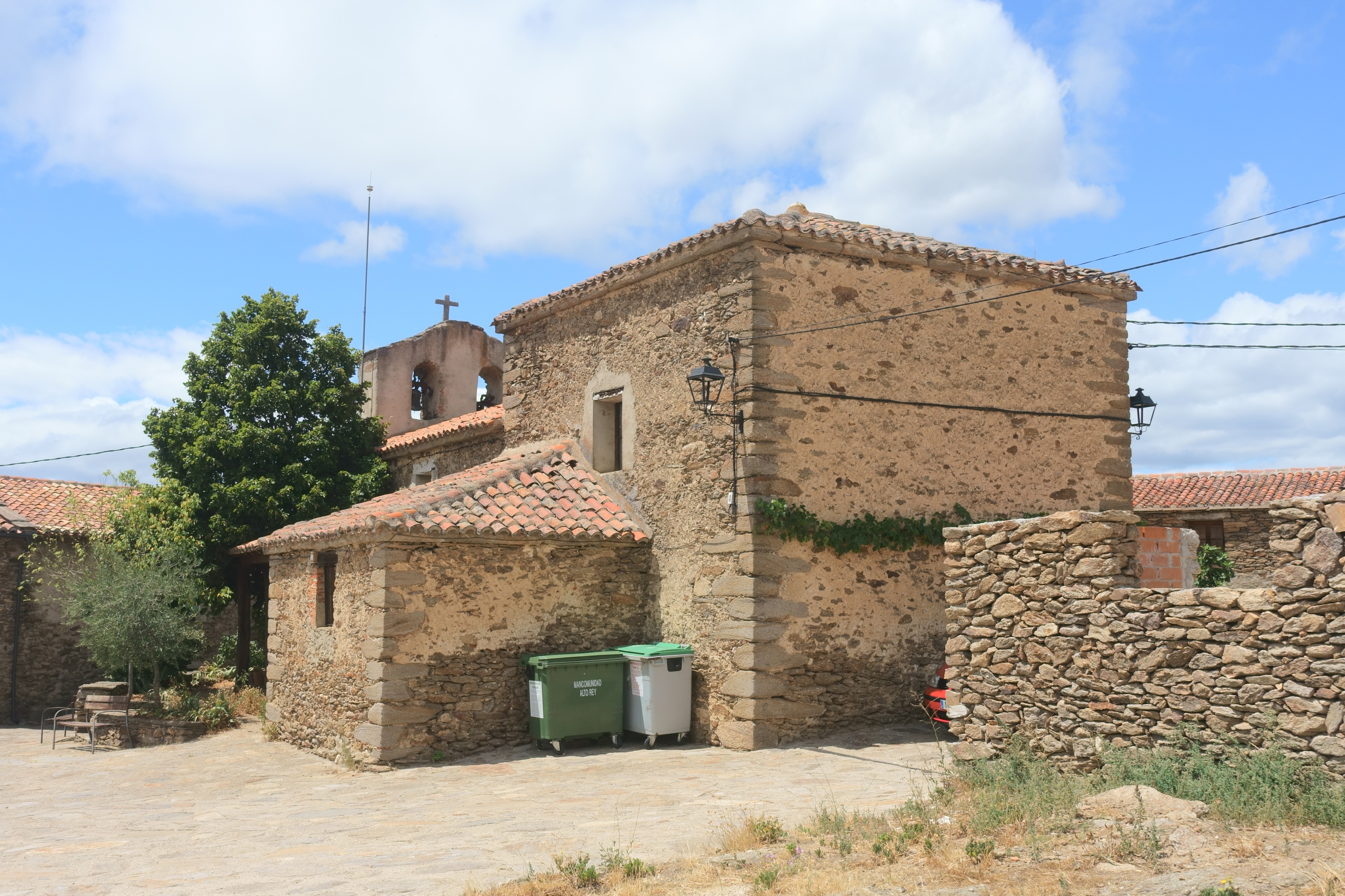 Iglesia de la Asunción de Nuestra Señora, Las Navas de Jadraque (Guadalajara, España).